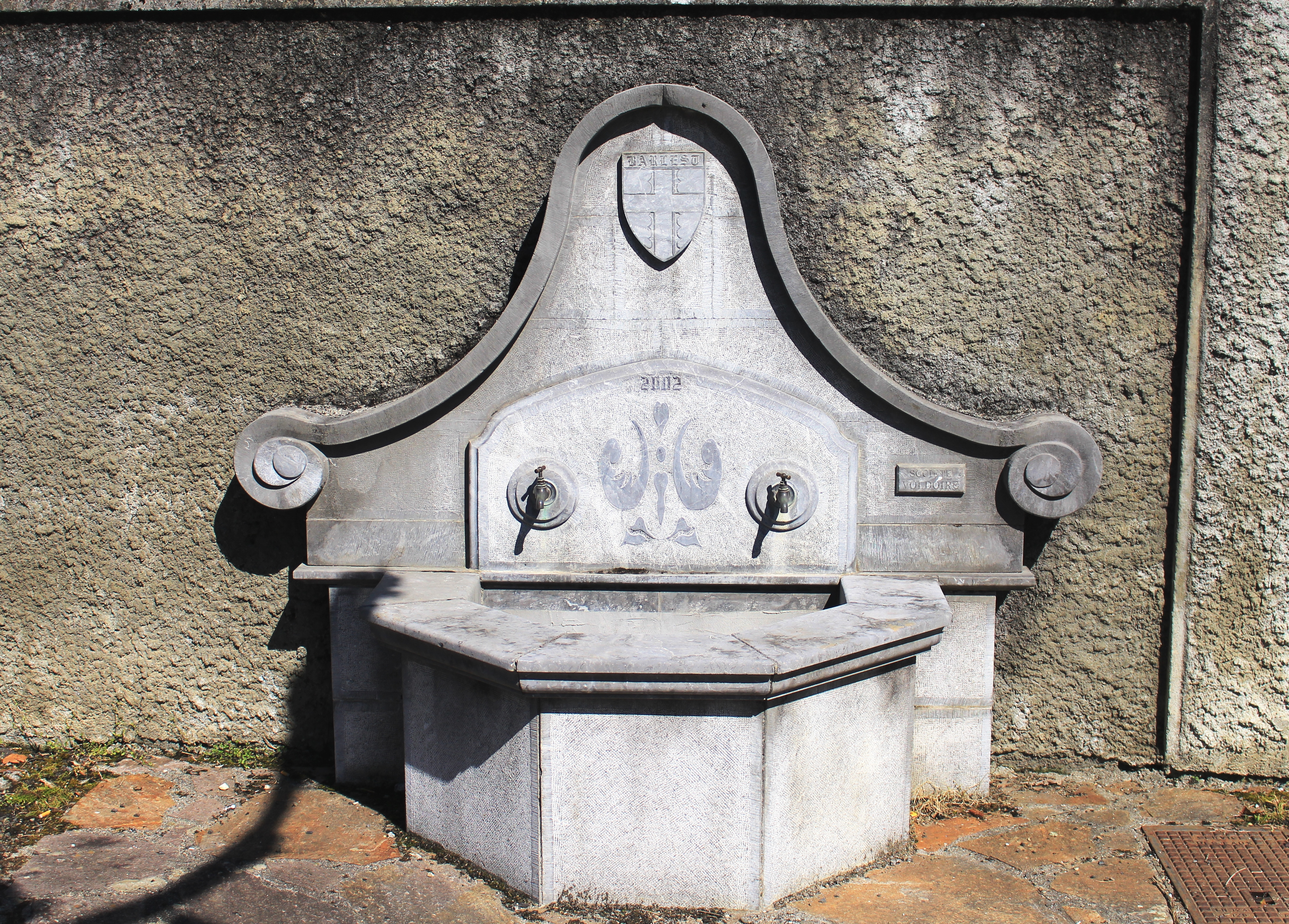 Fontaine de Barlest (Hautes-Pyrénées)